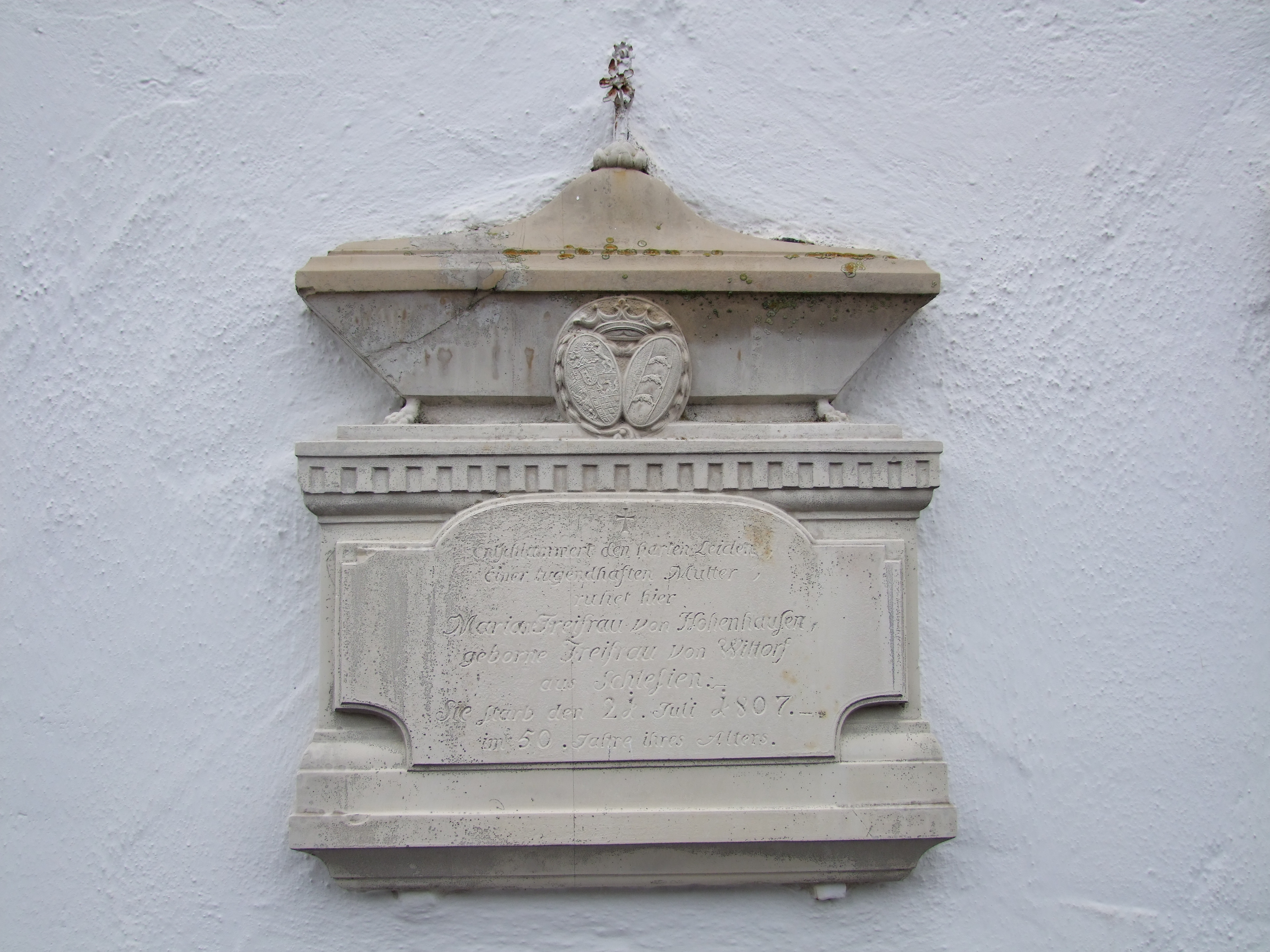 St. Stephanus im oberschwäbischen Kirchdorf, einem Ortsteil von Bad Wörishofen in Bayerisch/Schwaben